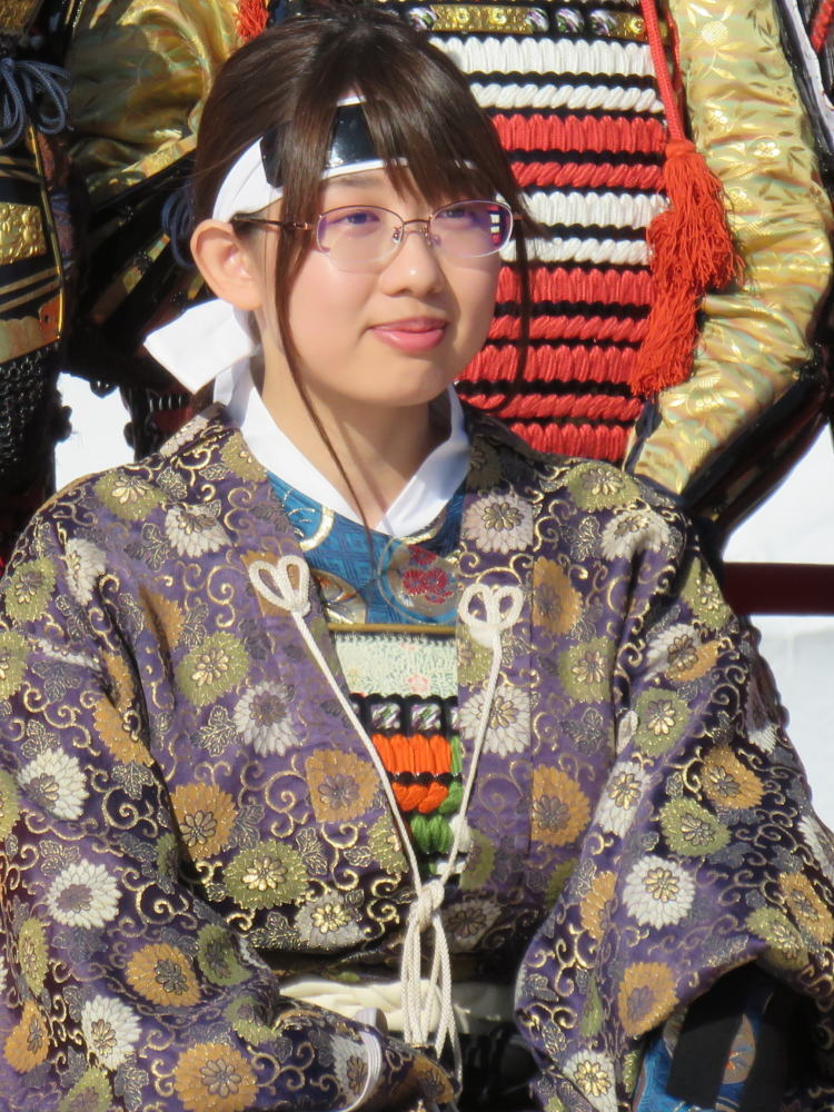 将棋棋士の脇田菜々子（令和元年年１１月、姫路市で行われた人間将棋にて）